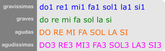 Uma tabela que demonstra o uso da notação musical chamada Cifra Melódica para a representação simples de notas musicais.